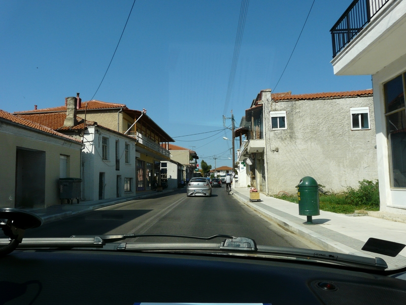 Лавара